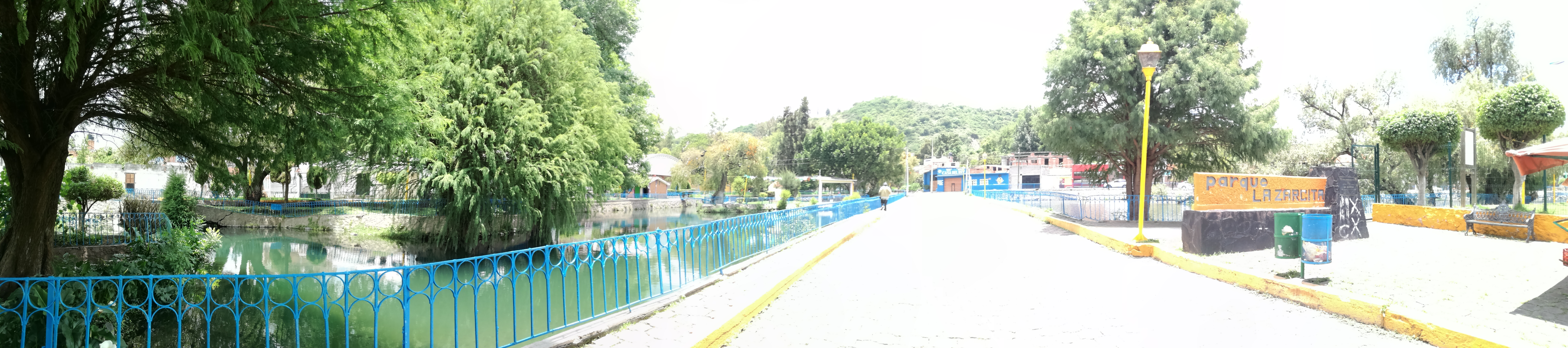 Parque La Zarcita en Zacapu, Michoacán